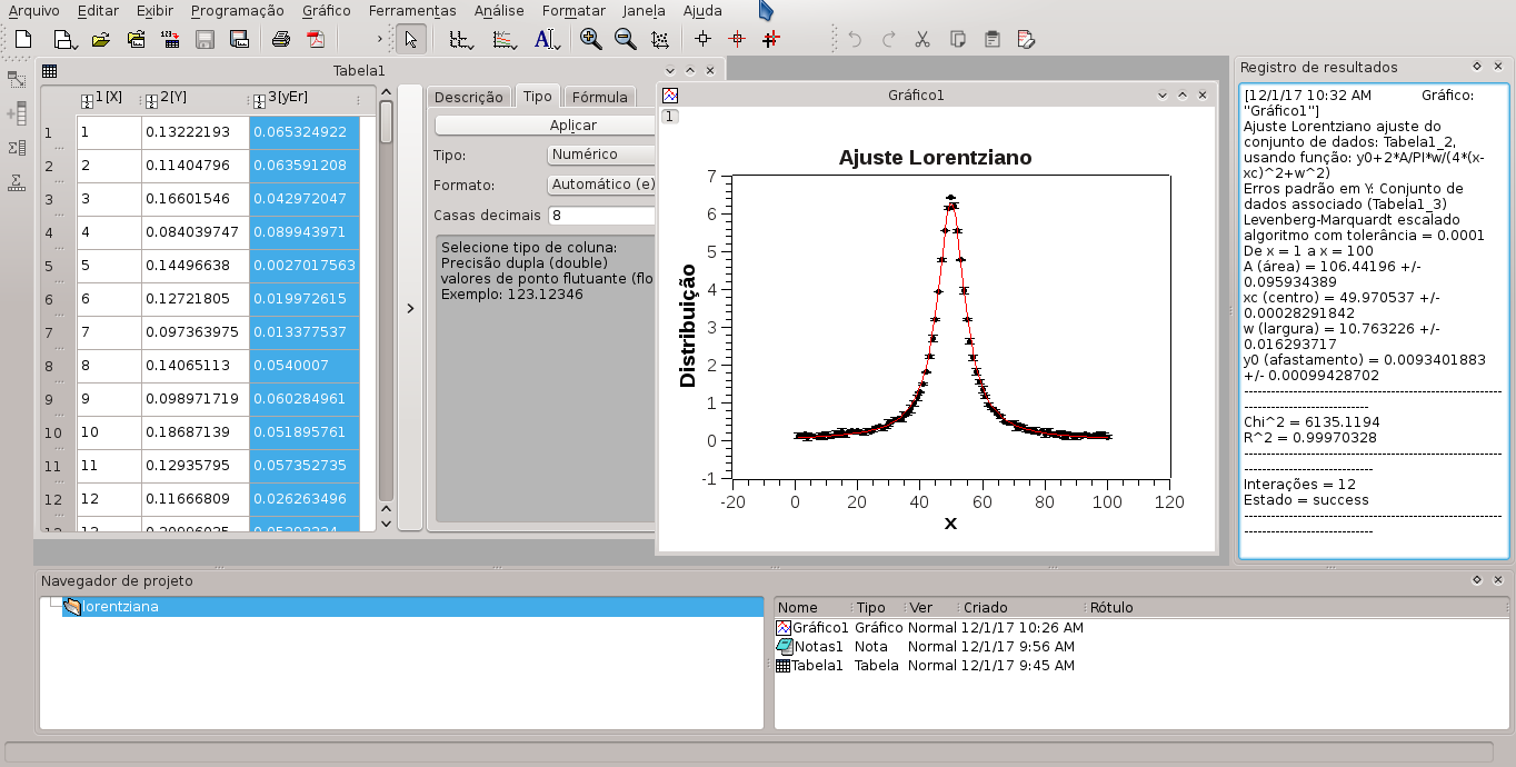 Captura de tela do SciDAVis 1.22 com interface em Português (Pt-BR), sendo executado no Slackware.